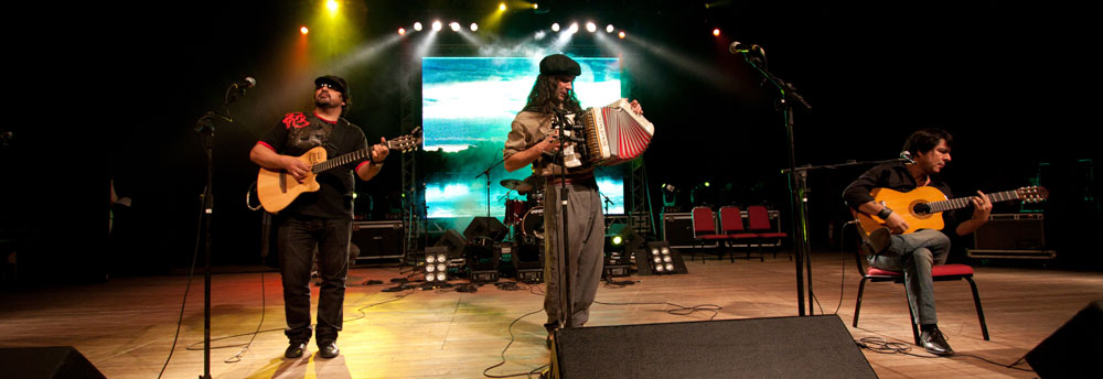 borghetti e sergio